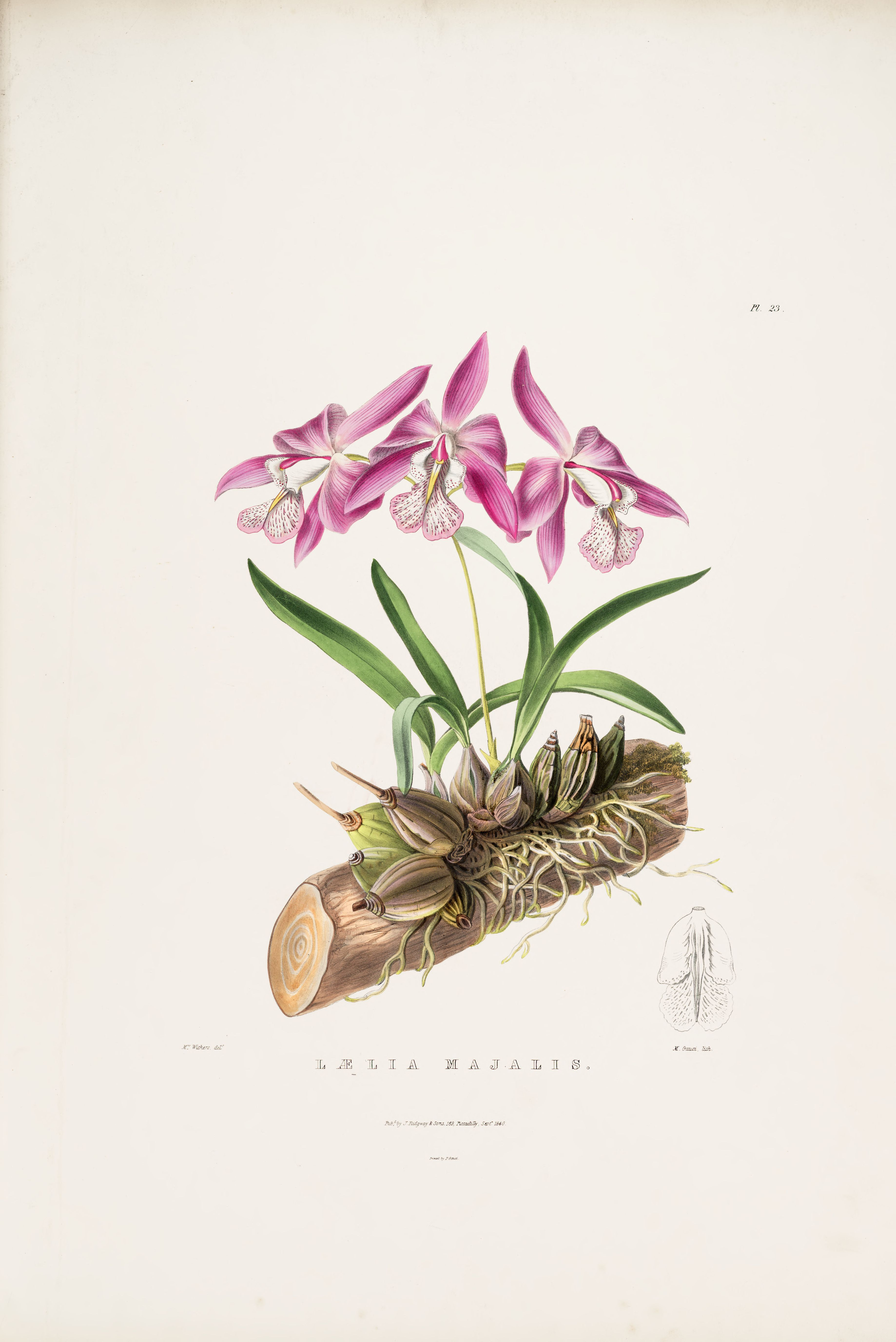 Illustration of Laelia speciosa (as syn. Laelia majalis)